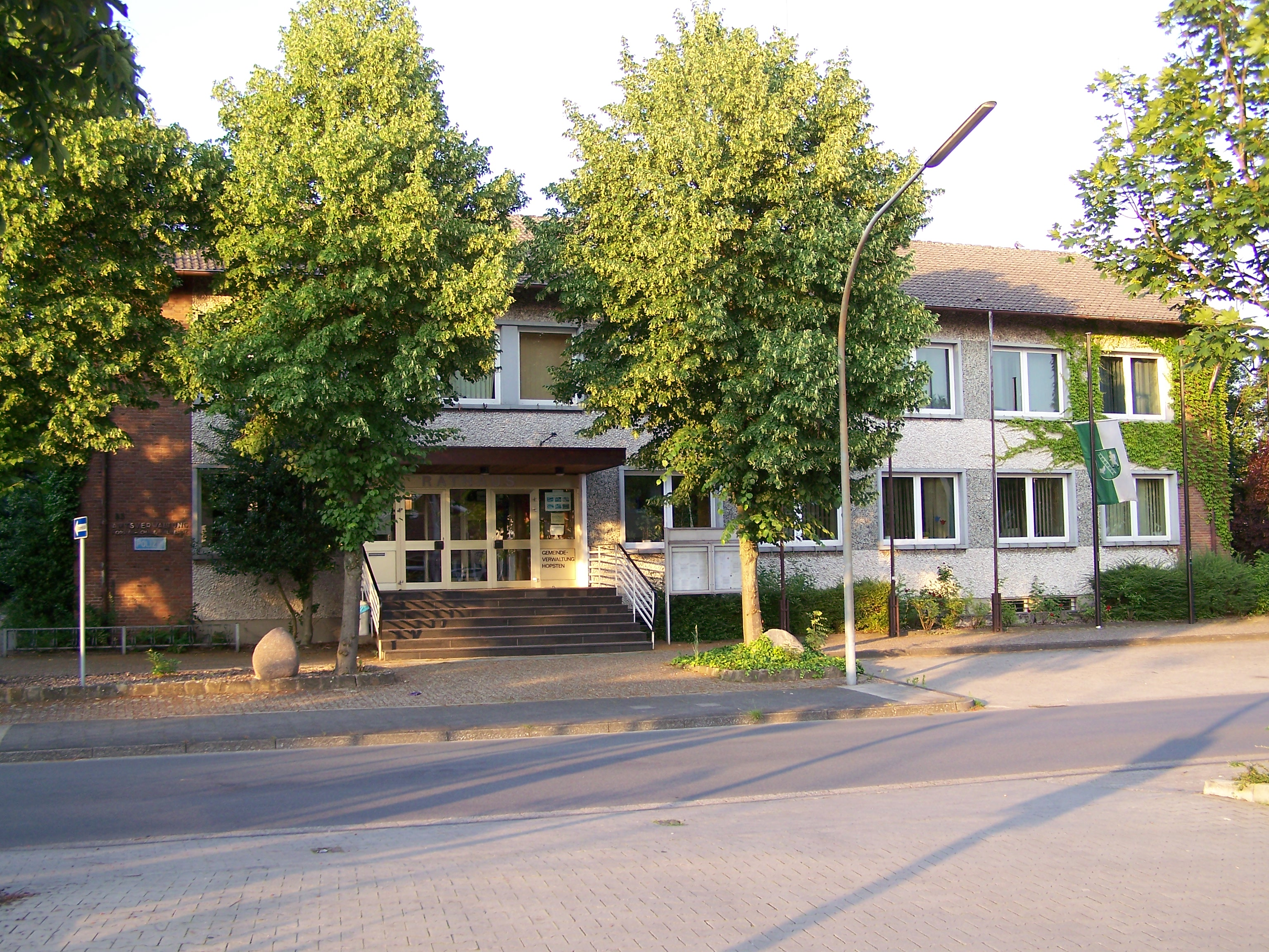 Das Rathaus in Hopsten an der Bunten Straße